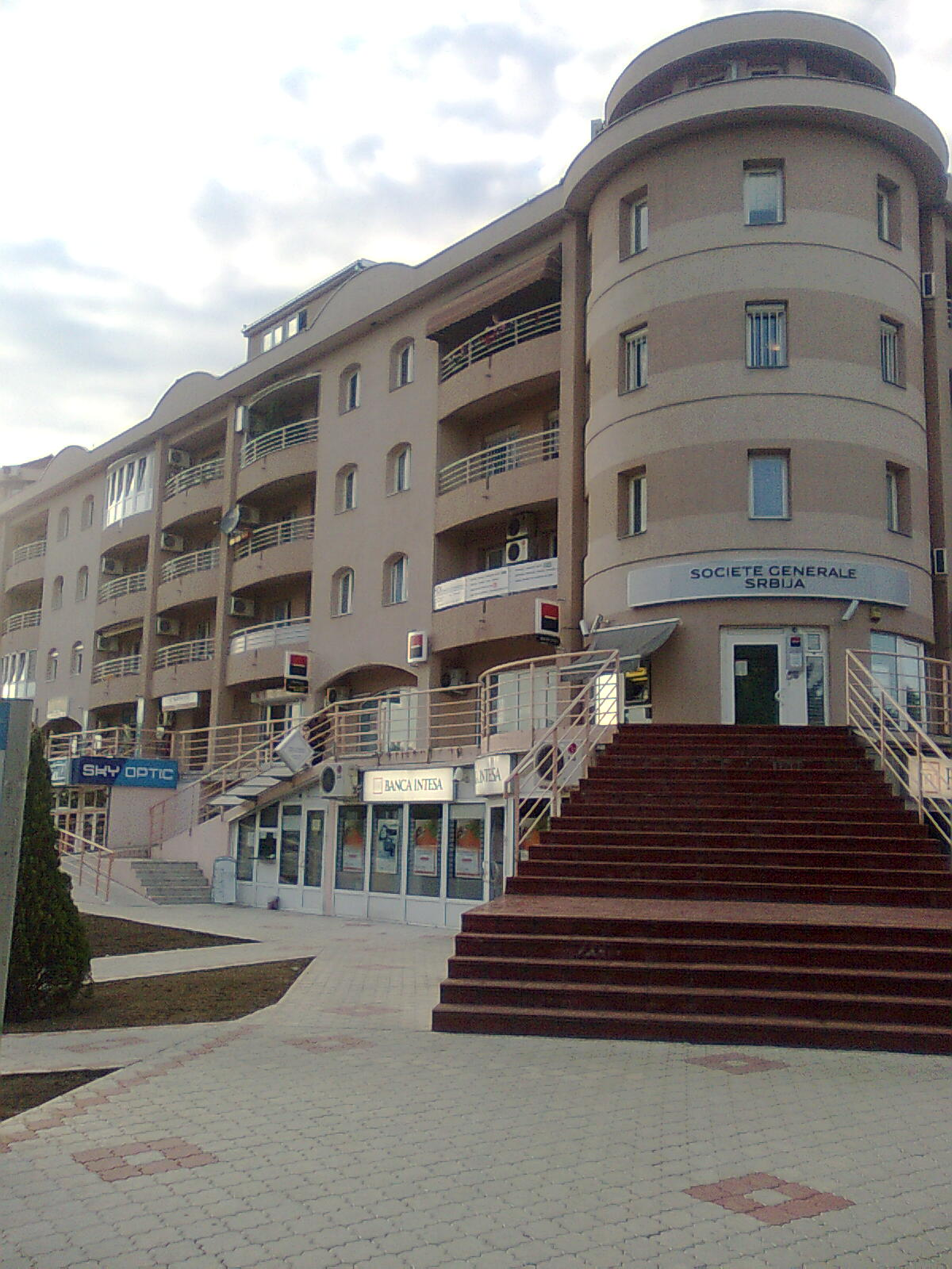 видиковац